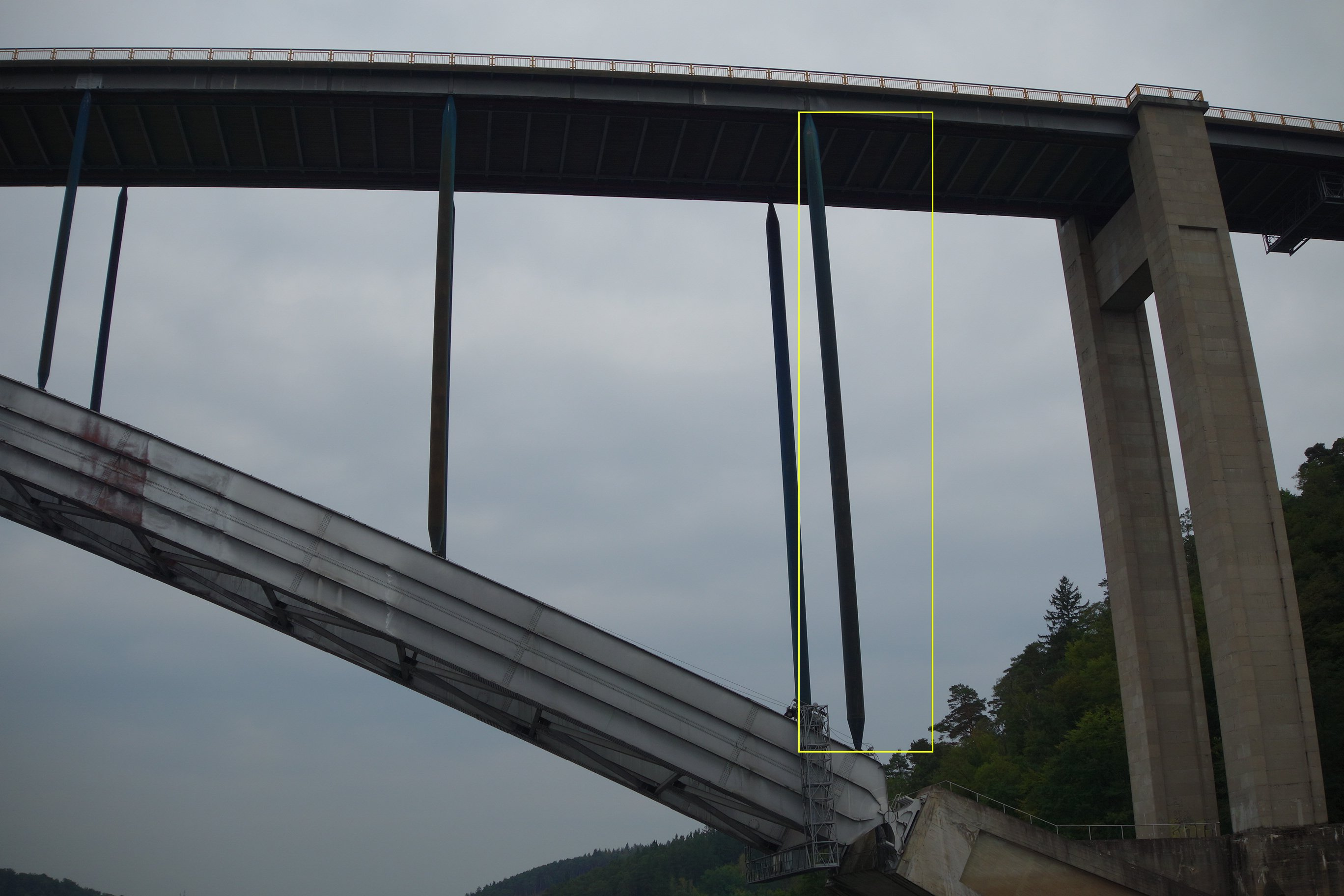 Pendelstützen oder Pendelstäbe sind die vertikalen Stäbe dieser Brücke (gelb markiert), die oben und unten gelenkig gelagert sind und nur Druckkräfte aufnehmen, keine Biegemomente